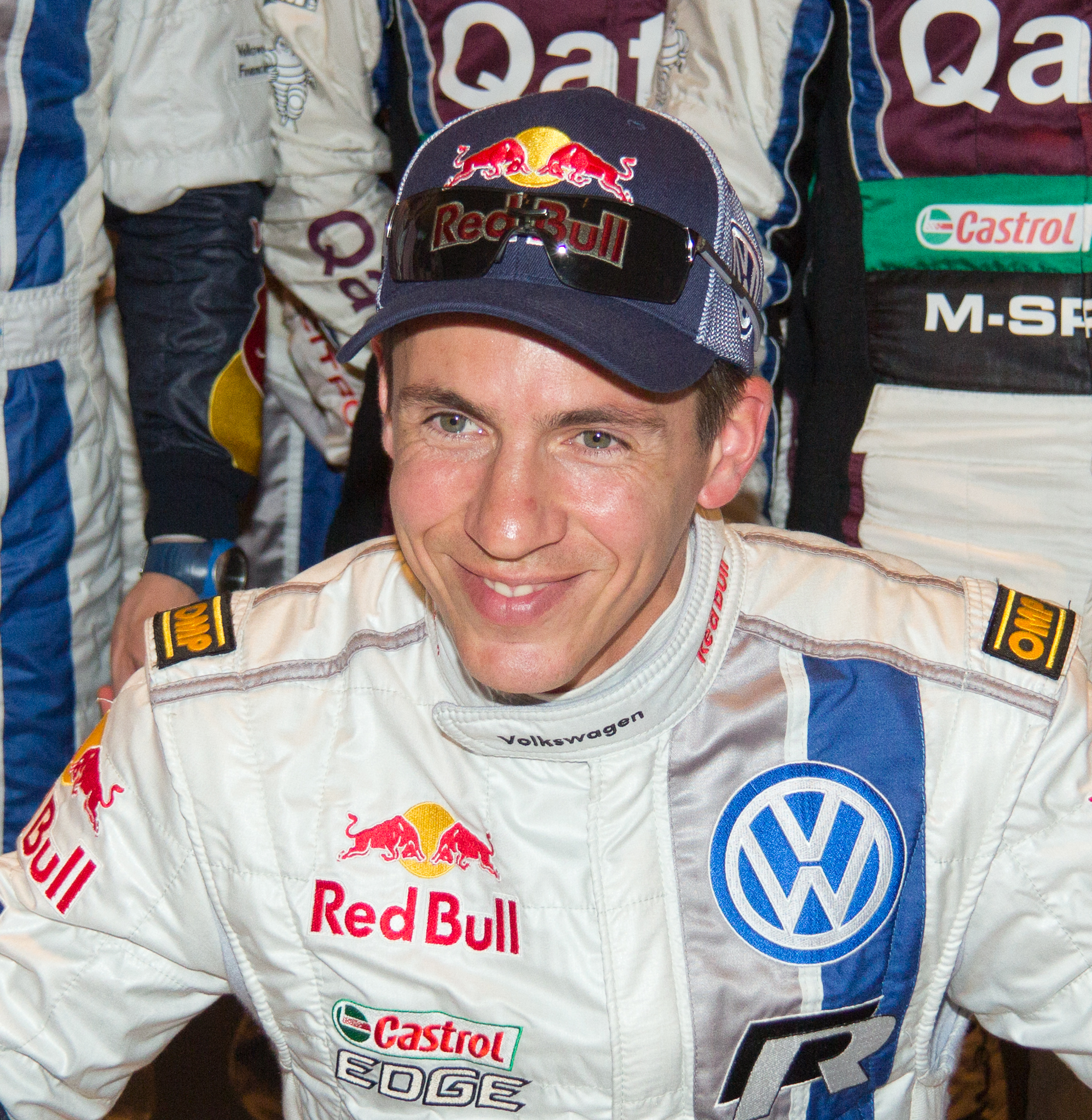 ADAC Rallye Deutschland 2013 - Empfang der Stadt Köln - Julien Ingrassia. Eintragung in der Gästebuch der Stadt Köln